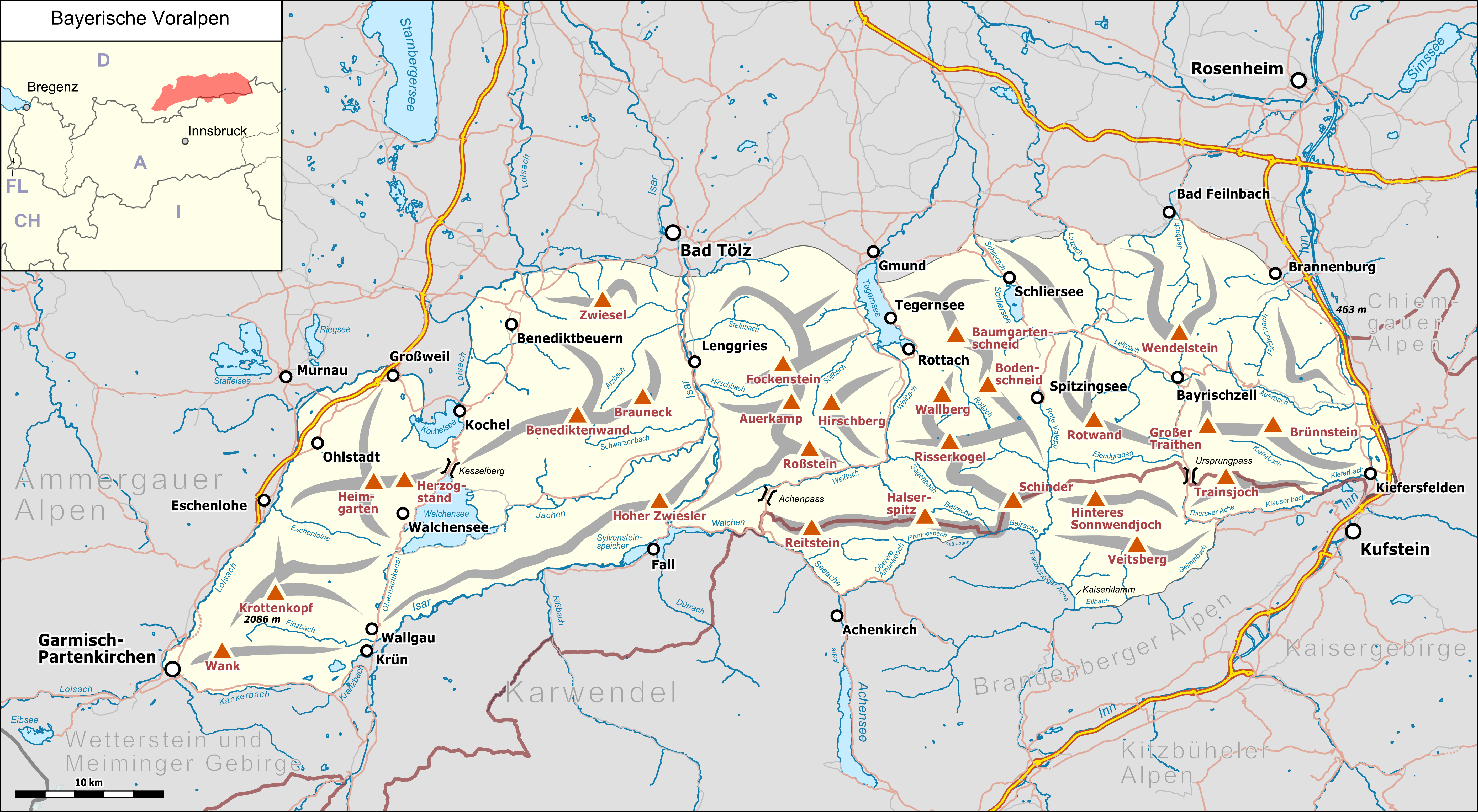 Übersichtskarte der Bayerischen Voralpen.